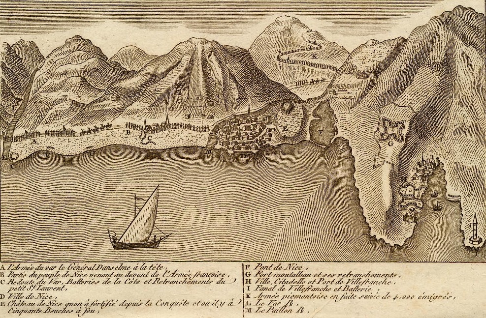 Aanzicht van de vesting Nice met zijn haven en forten. Franse troepen naderen de stad.